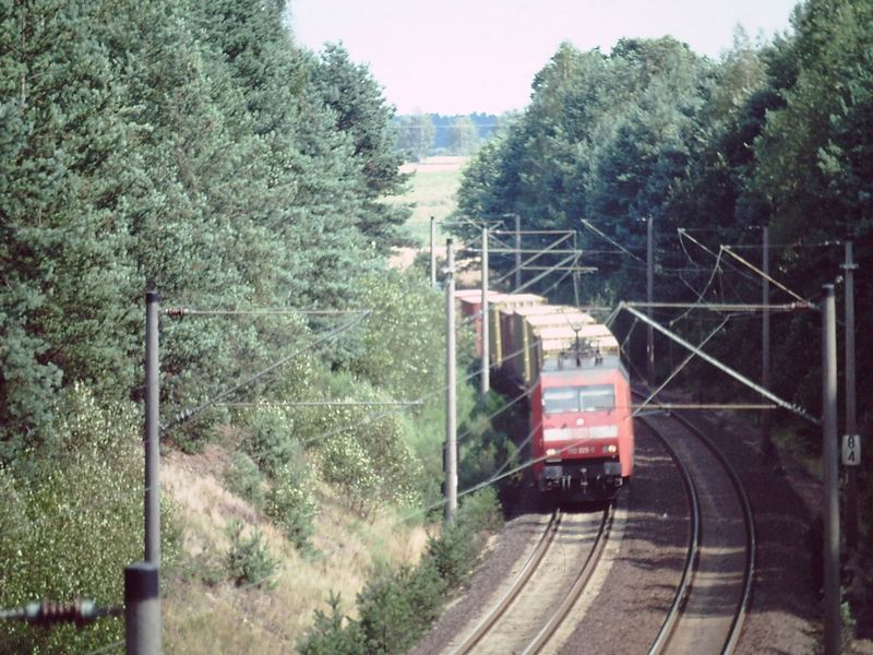 Elektrolokomotive 152 029 mit Güterzug auf der Güterumgehungsbahn Maschen-Buchholz.